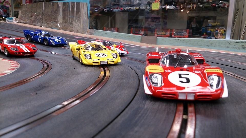 YSR race Mr.ky